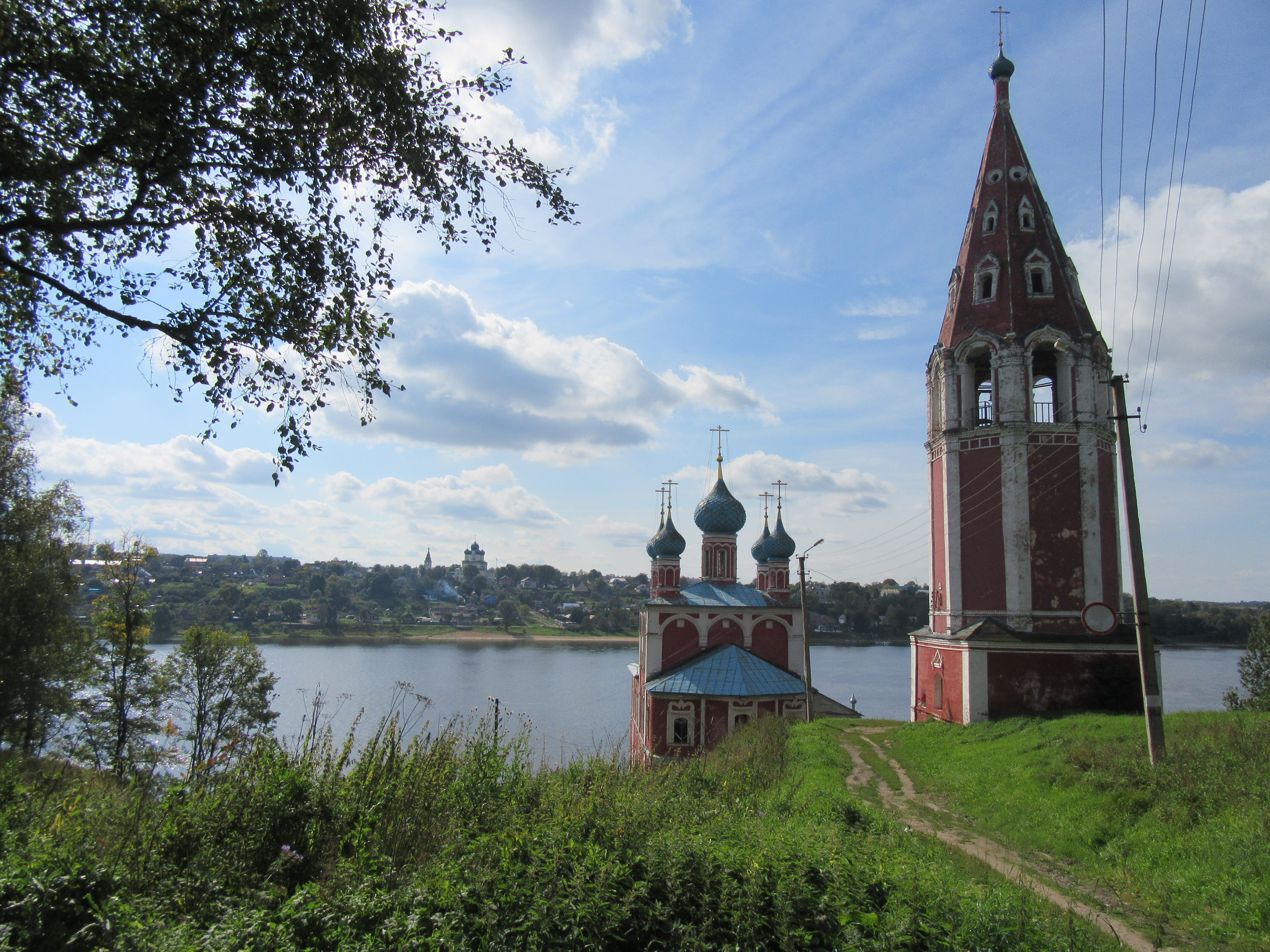 Vue de l'église de la Transfiguration et de Kazan et de Toutaïev sur l'autre rive de la Volga